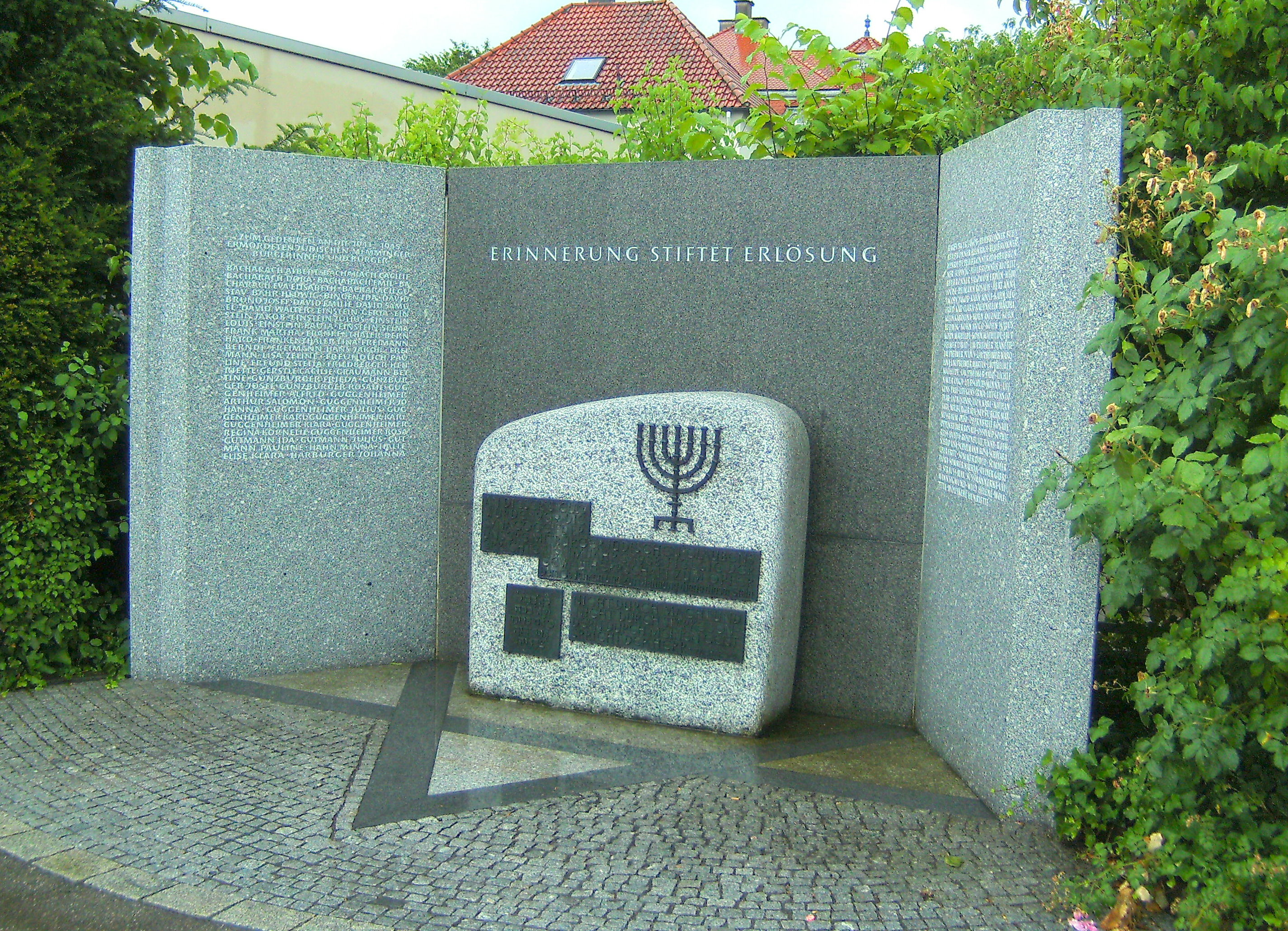 Gedenkstein am Schweizer Berg, der an die frühere Synagoge die in der Reichskristallnacht von einem Mob zerstört wurde, erinnern soll.